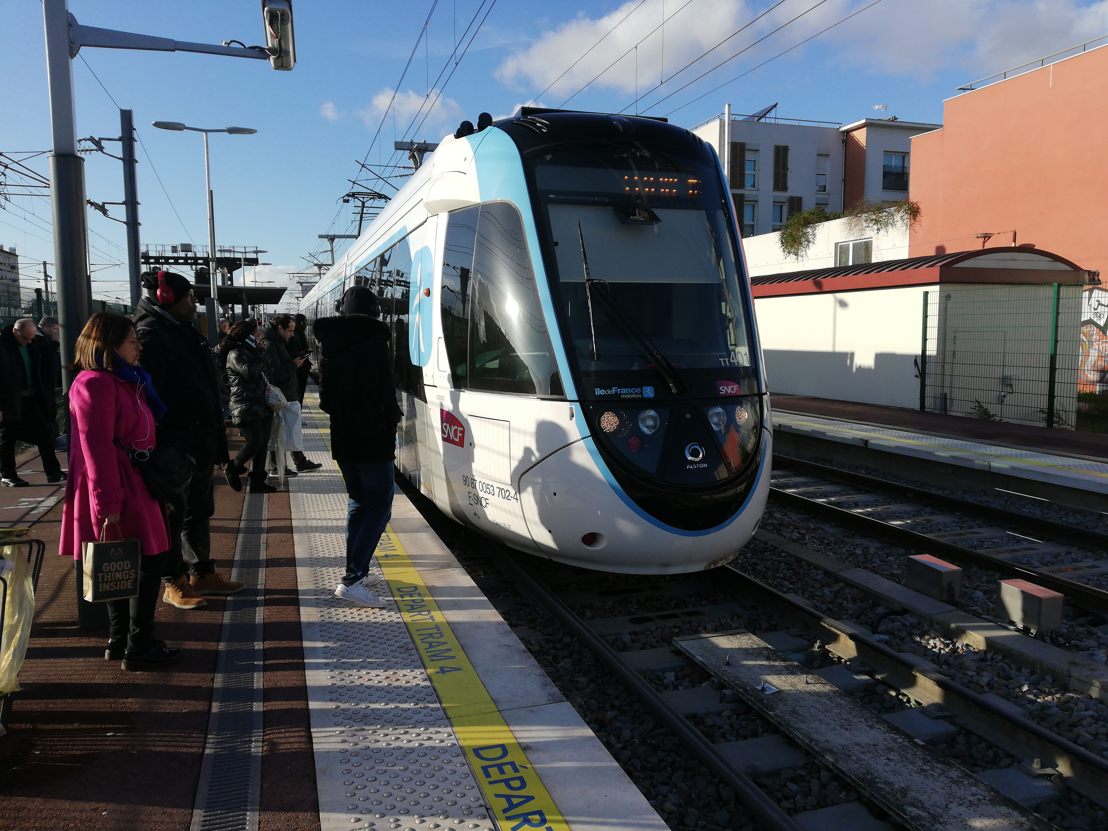 Un Citadis Dualis (U 53700) stationne à la station Clichy-Montfermeil de la ligne 4 du tramway d'Île-de-France en 2020.